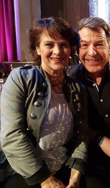 Nicki und Patrick Linder bei der Aufzeichnung "Meine Schlagerwelt - Die Party mit Ross Antony" im Leipziger Eventpalast